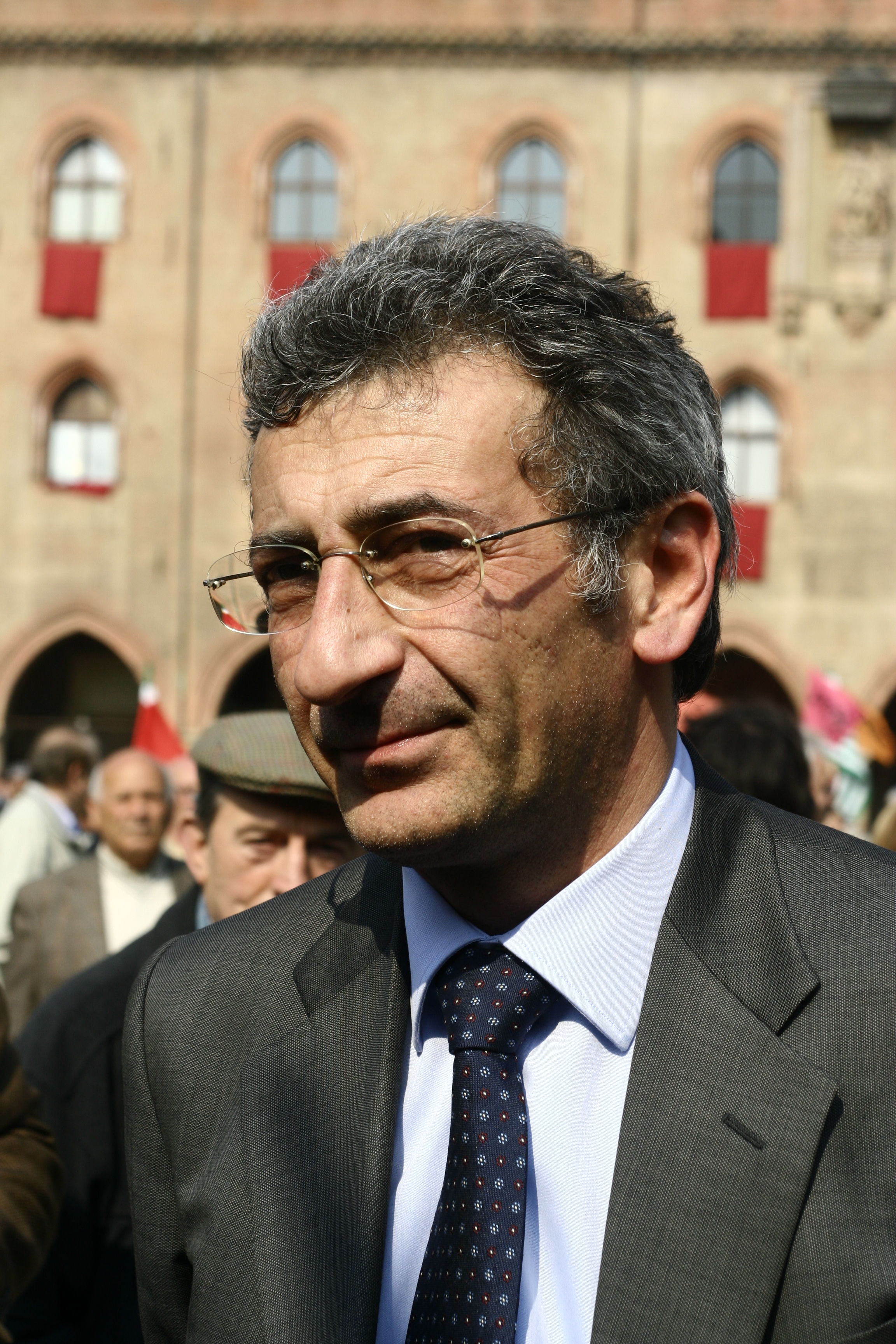 Il Candidato sindaco Flavio Delbono alla festa dei lavoratori a Bologna.